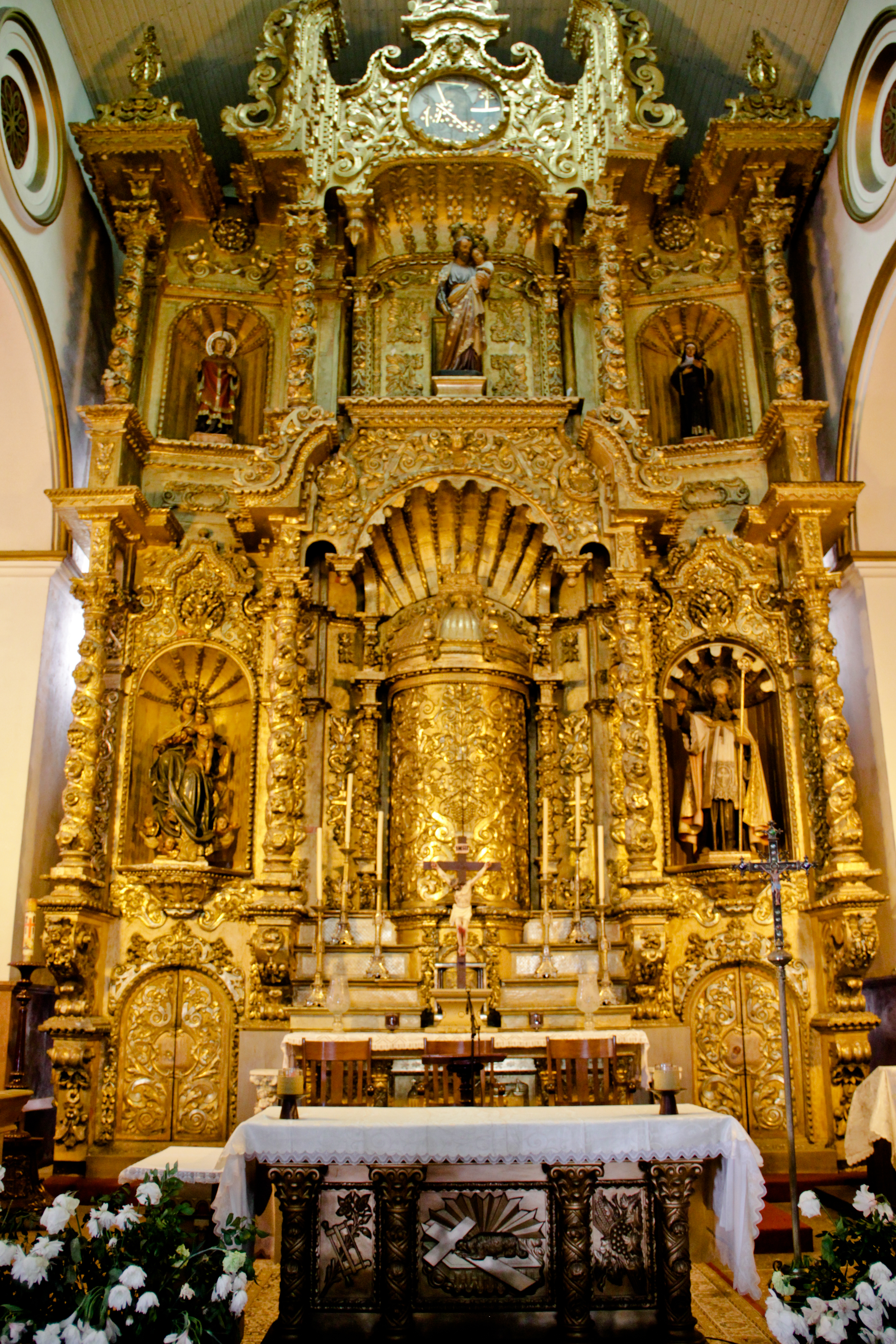 altar de oro ubicado en el casco antiguo de Panamá